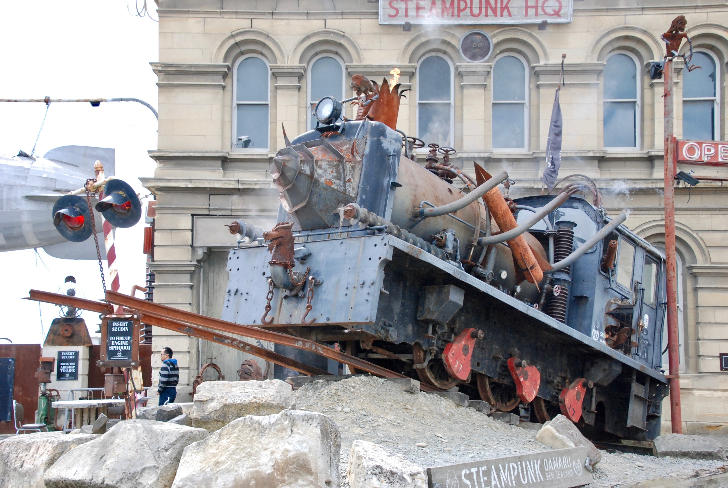 Locomotive animée au musée Steampunk d'Oamaru (Nouvelle Zélande)